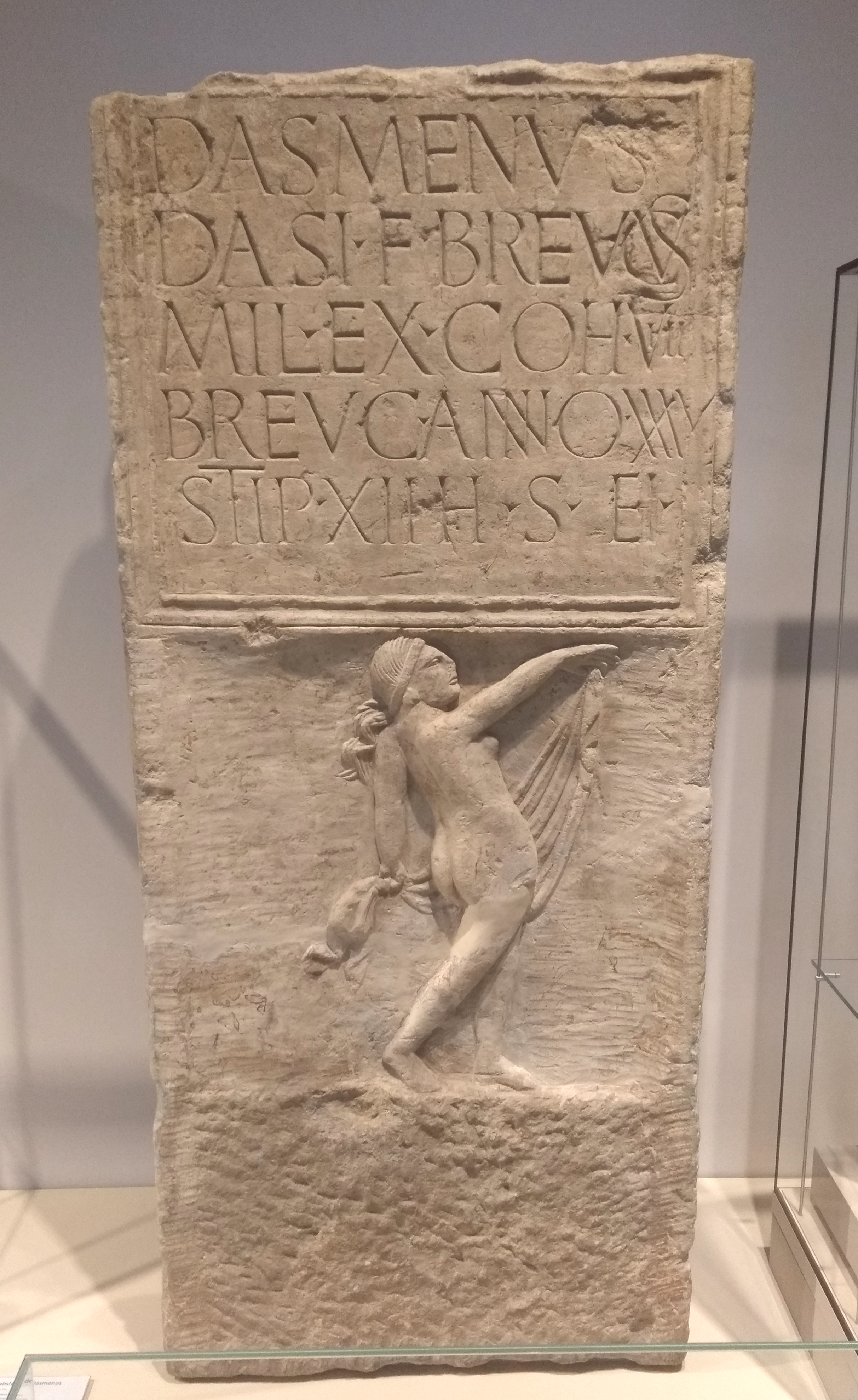 Grabstein des römischen Hilfstruppensoldaten Dasmenus vom illyrischen Stamm der Breuker, 40/50 n. Chr. (CIL XIII,7801), im 17. Jahrhundert in der Kirche von Remagen als Grabplatte wiederverwendet und auf der Rückseite mit Wappen und Inschrift versehen, heute im Rheinischen Landesmuseum Bonn